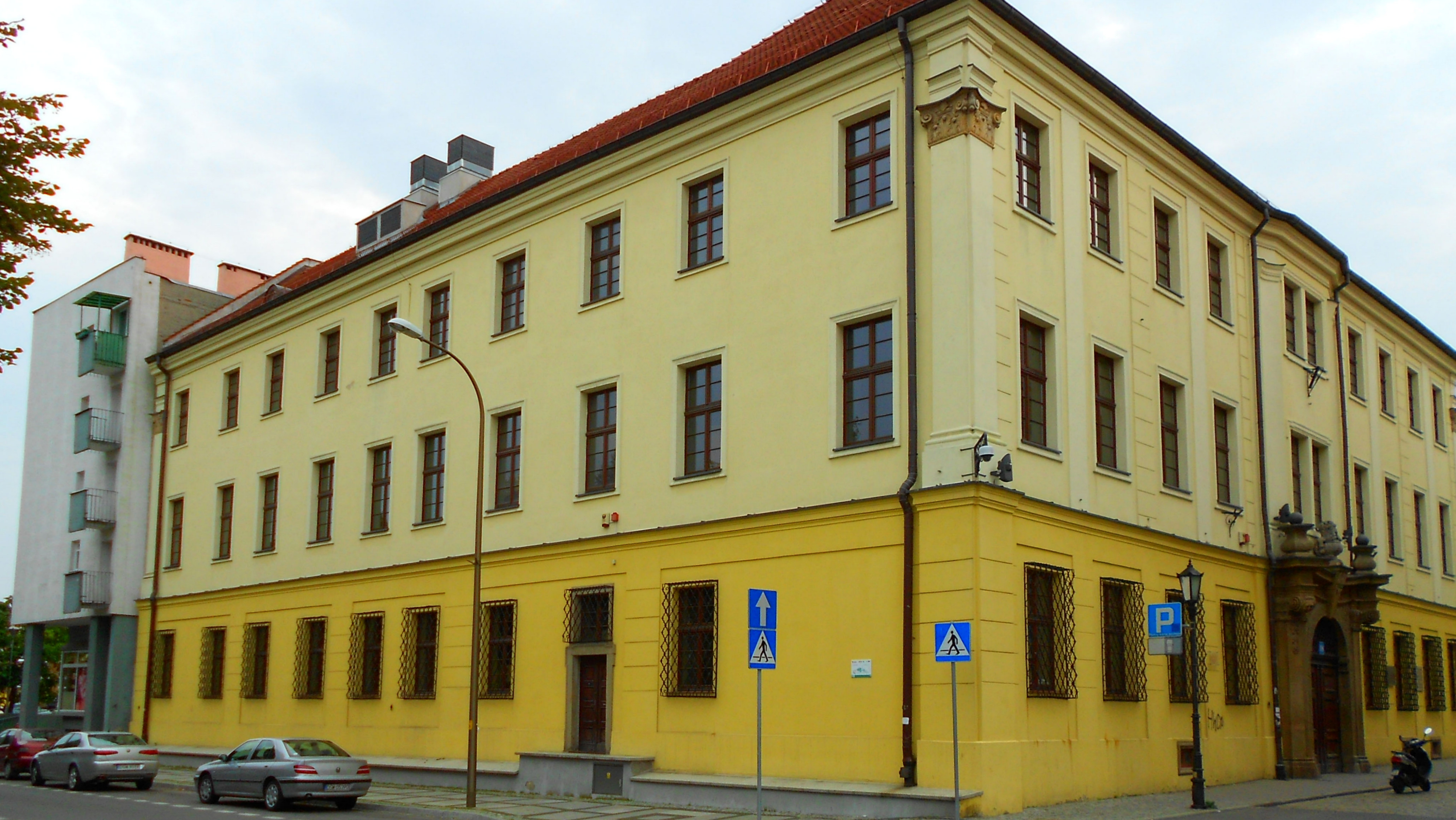 Pałac Opatów Lubiąskich w Świdnicy, obecnie Biblioteka Miejska. Świdnica, Franciszkańska 18, Świdnica